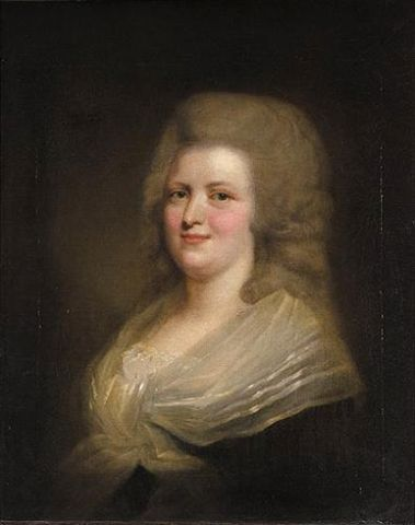 Portrait de Clotilde de France (1759-1802)